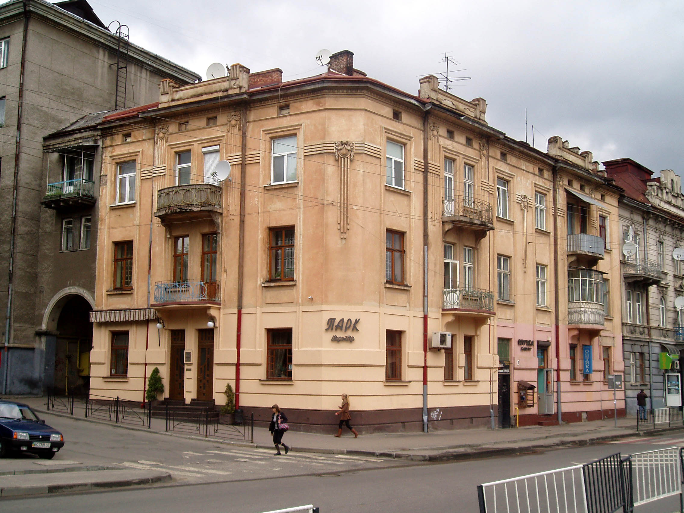 Дім № 8 на вулиці Сахарова у Львові.